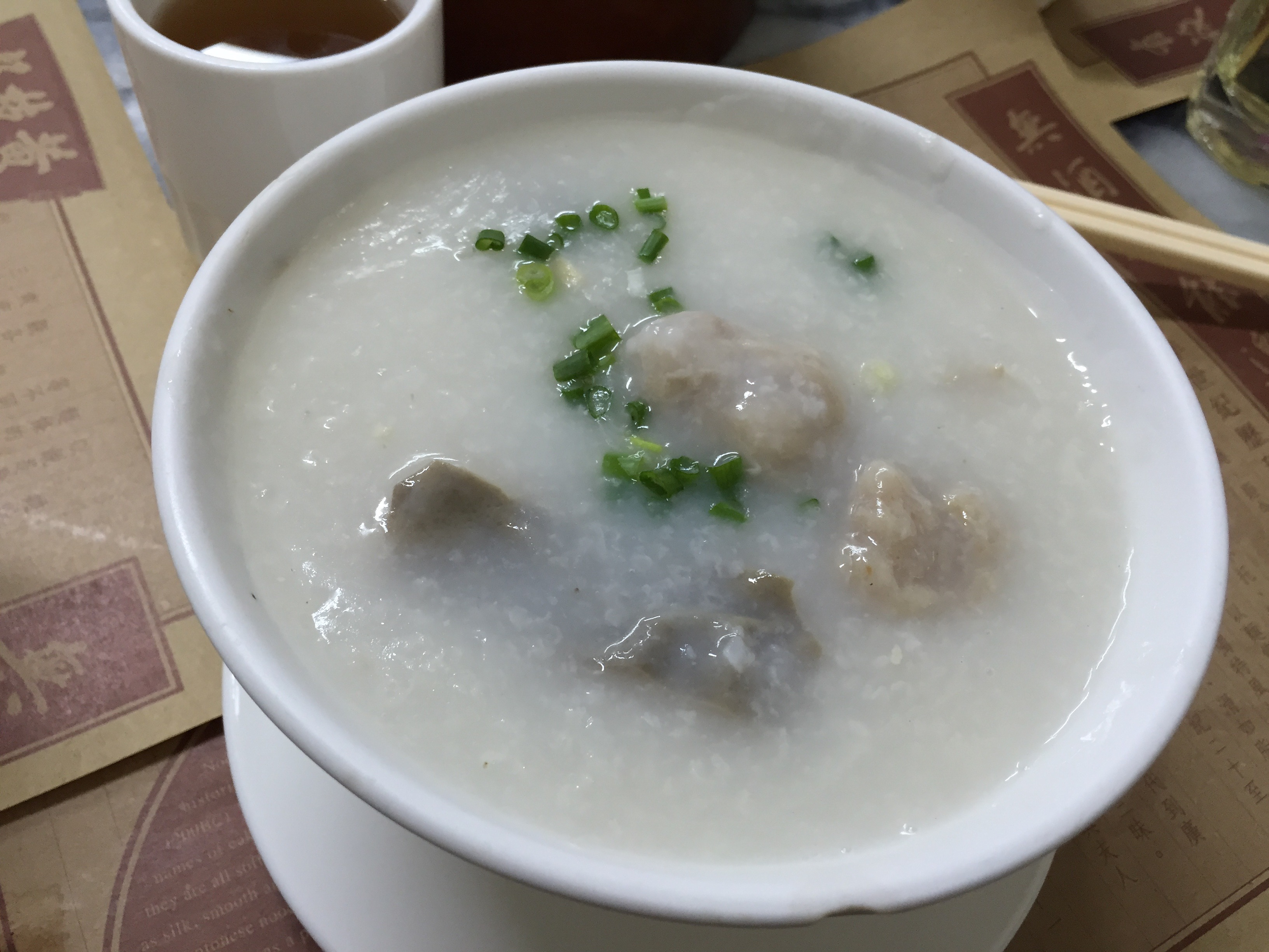 Macau, 狀元及第粥, 黃枝記粥麵, 新馬路, 澳門